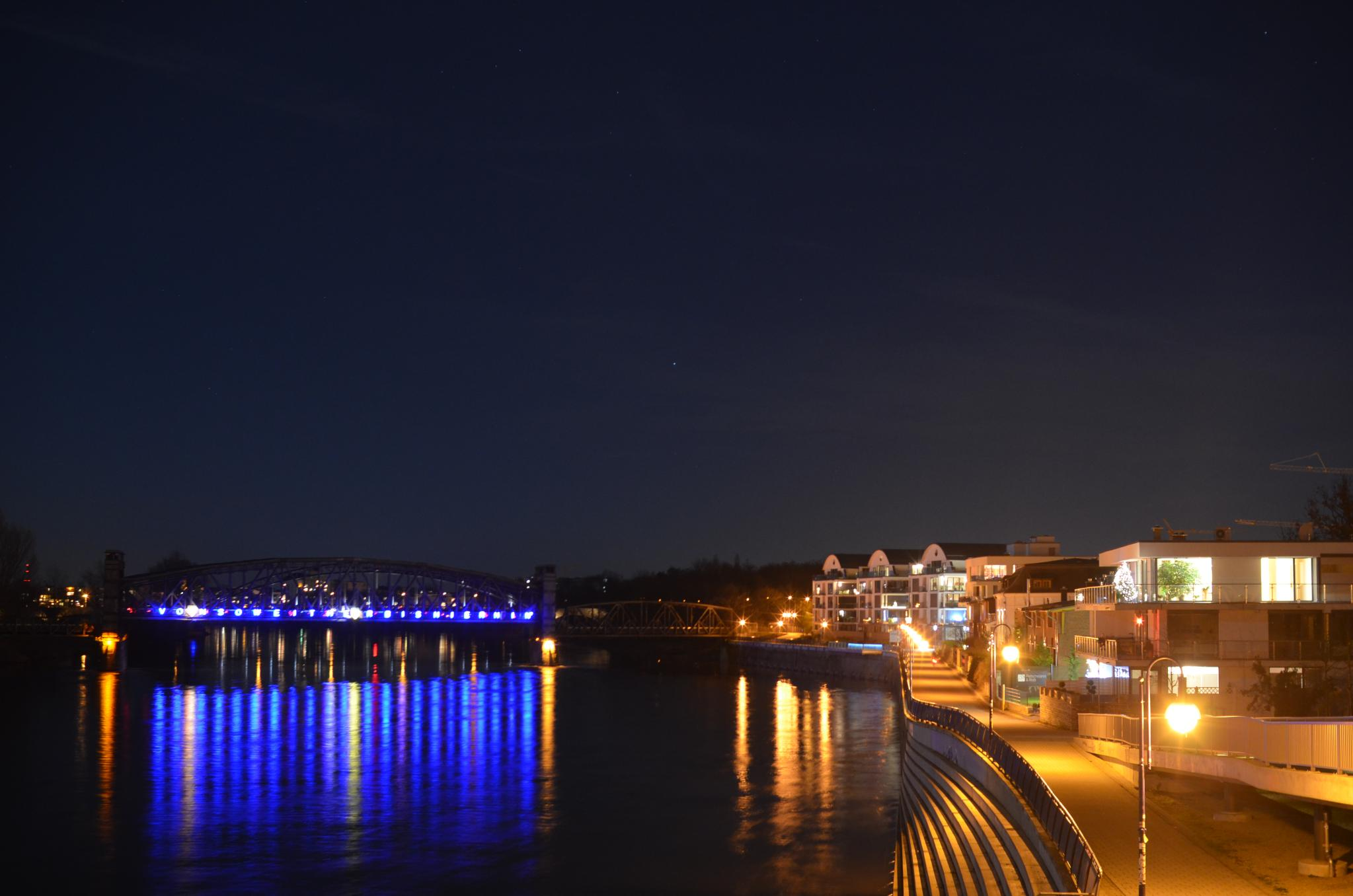 Elbstufen und Hubbrücke bei Nacht / Magdeburg Rechts das moderne Elbviertel